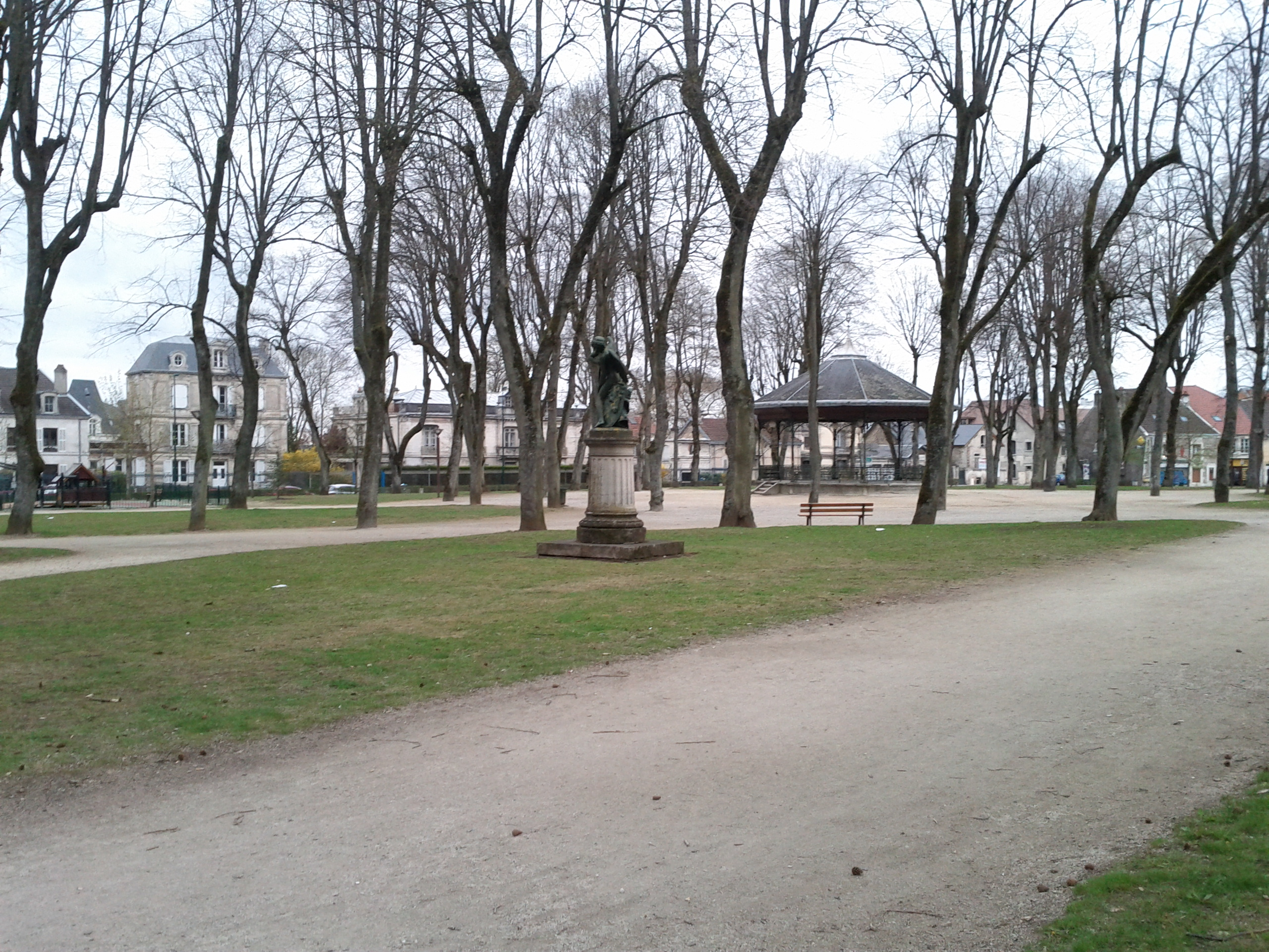 52000 Chaumont, France